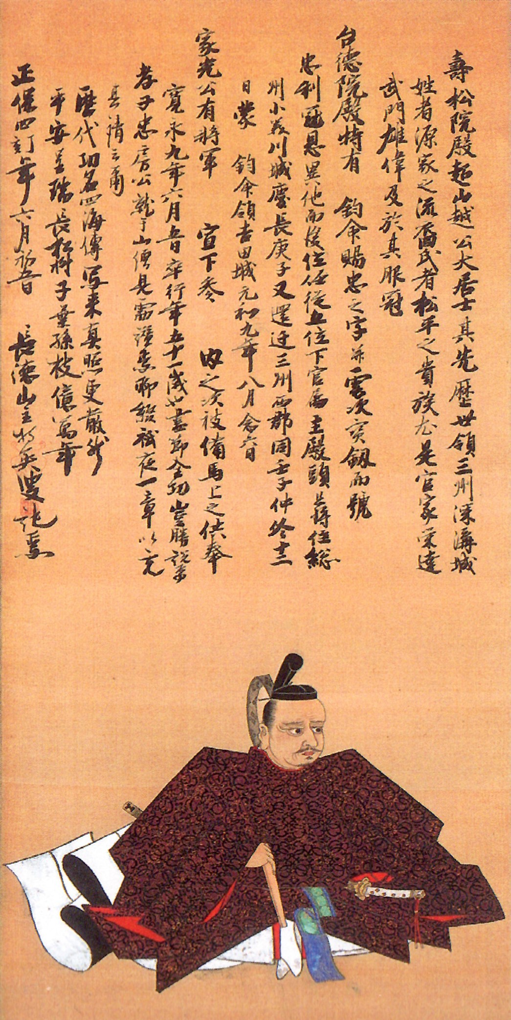 松平忠利の肖像。